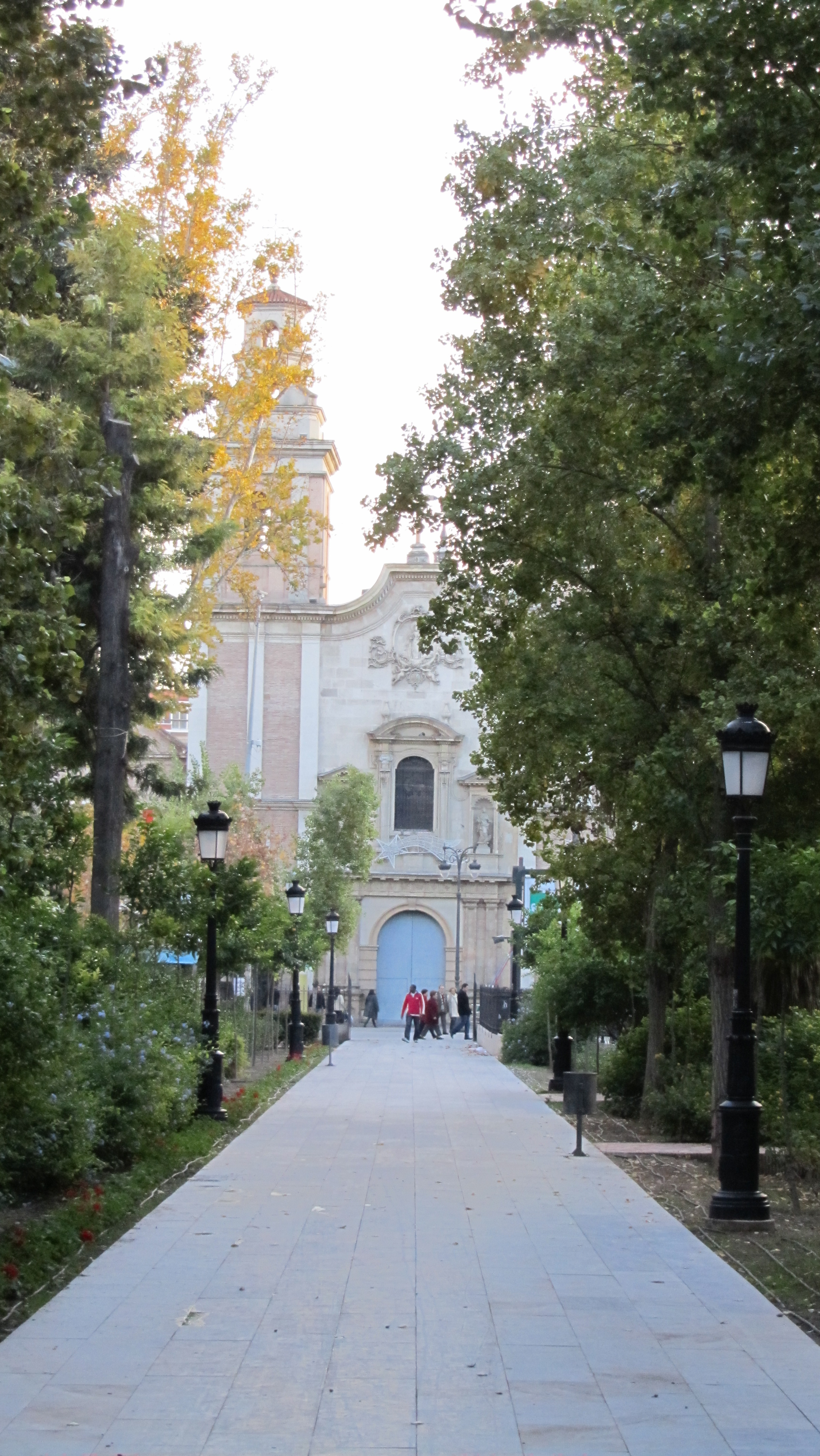 Alameda del Jardín de Floridablanca, con la iglesia del Carmen al fondo. Murcia (Región de Murcia, España). Antes de su última remodelación